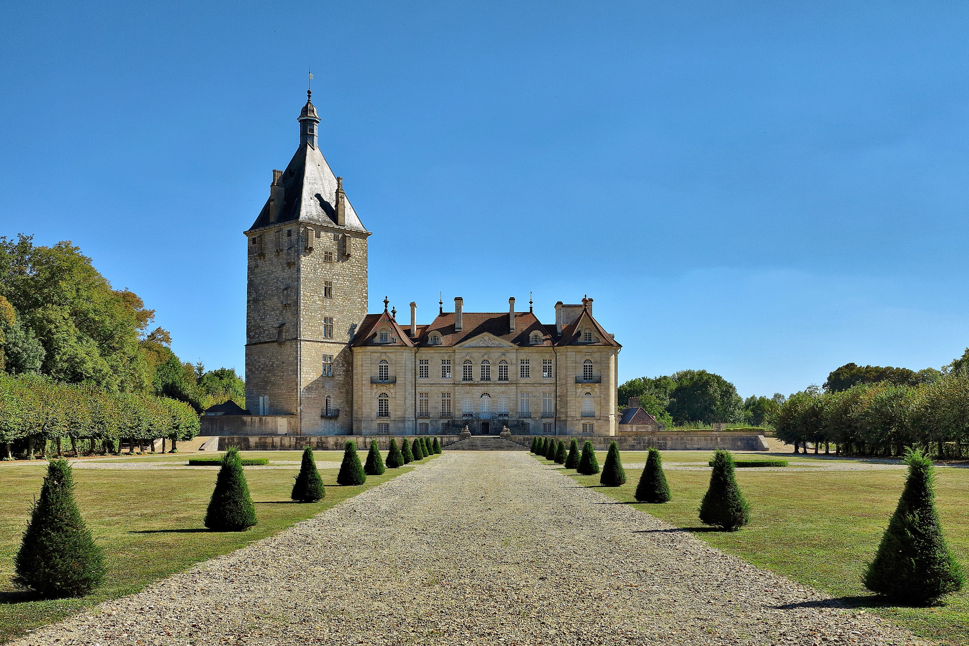 Le château (côté jardin) .